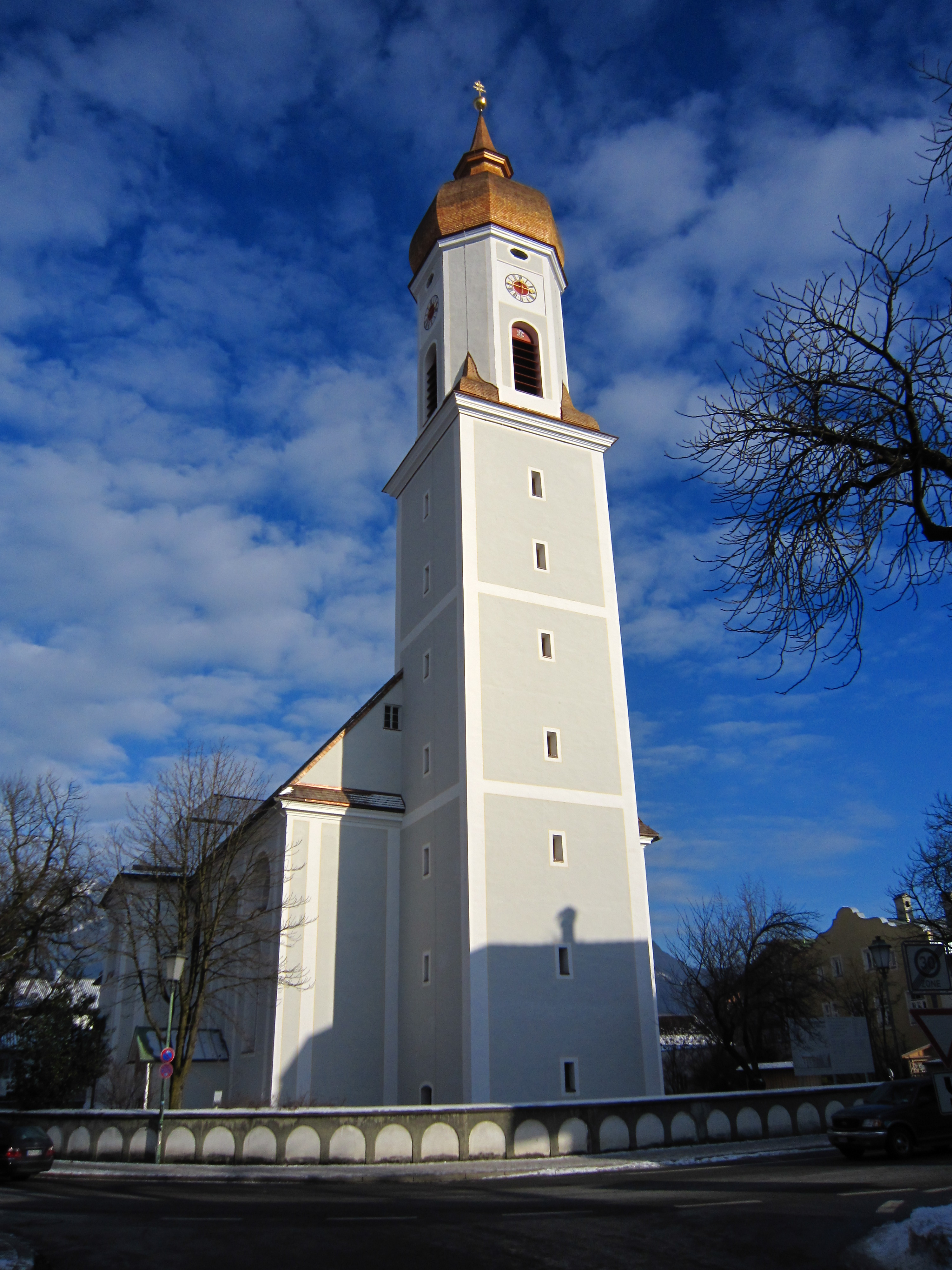 Die Pfarrkirche St. Martin in Garmisch. Jetzt mit neuer alter Farbgebung.